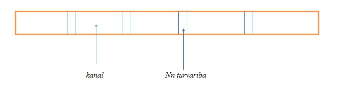 Spekter on jaotatud väikesteks sagedusaladeks – kanaliteks, millest iga kasutaja saab ühe kanali. Nii öelda turvariba peab olema kanalite vahel, et ei tekiks häireid ja kattuvusi kanalite vahel.